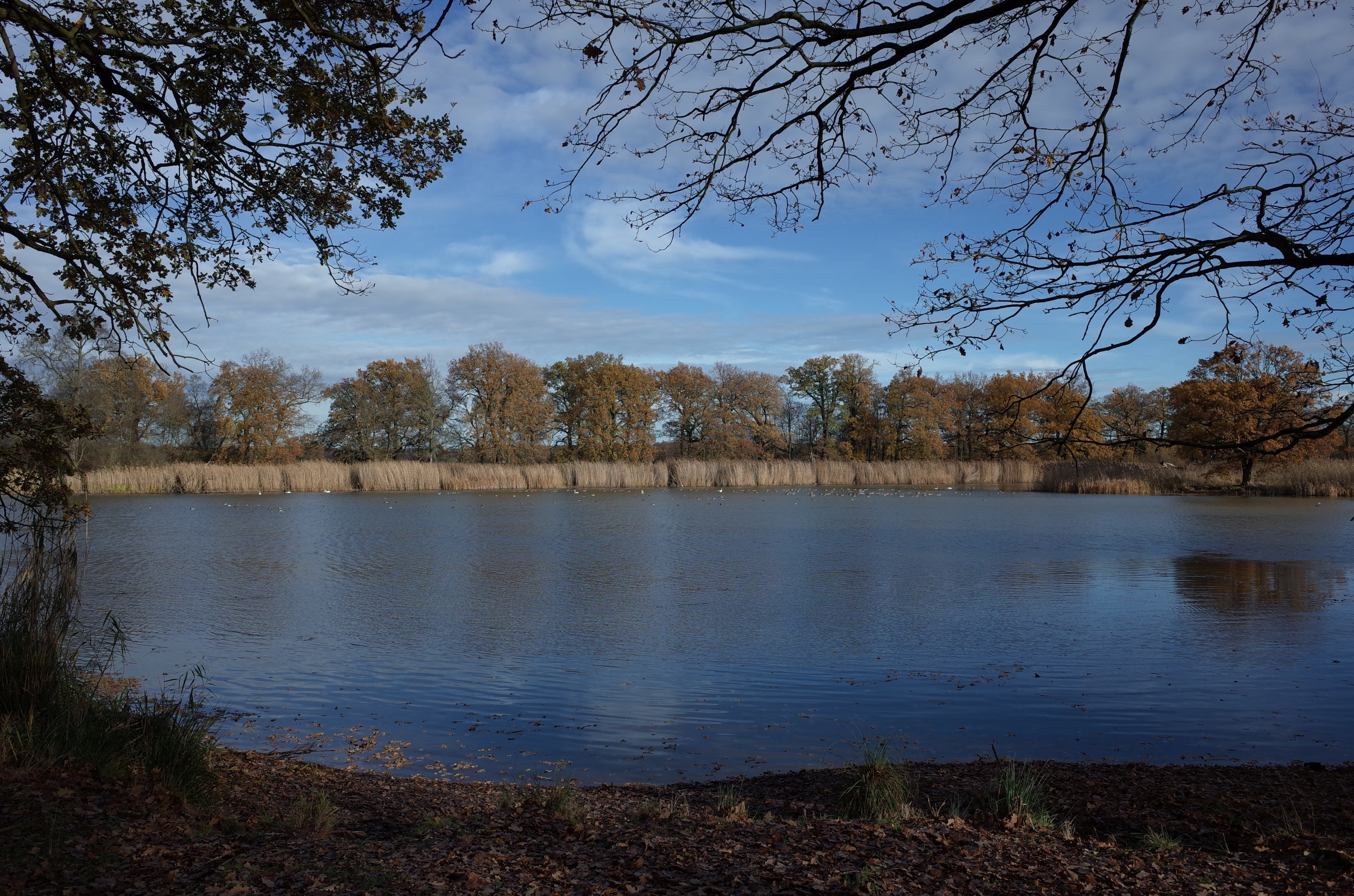 Dessau-Roßlau, Ortsteil Großkühnau, Kühnauer See. Der See gehört zum Kühnauer Landschaftspark und ist Teil vom Naturschutzgebiet Saalberghau.